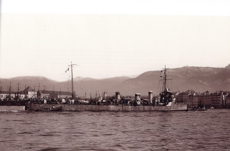 Arabe classe contre-torpilleur français (1917)